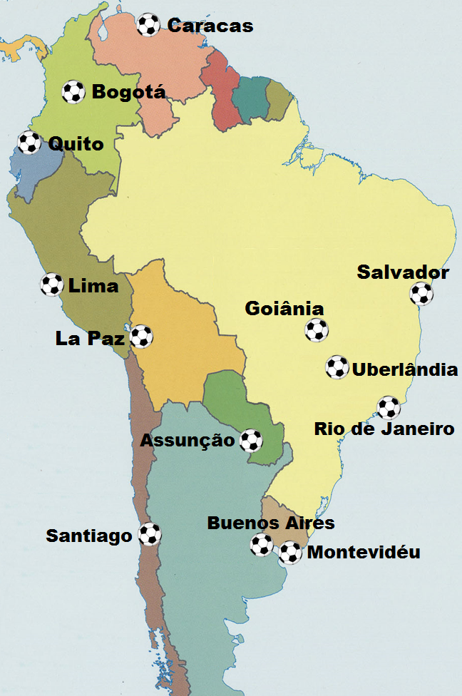 Mapa de localização das cidades que receberam as partidas da Copa América de 1983.